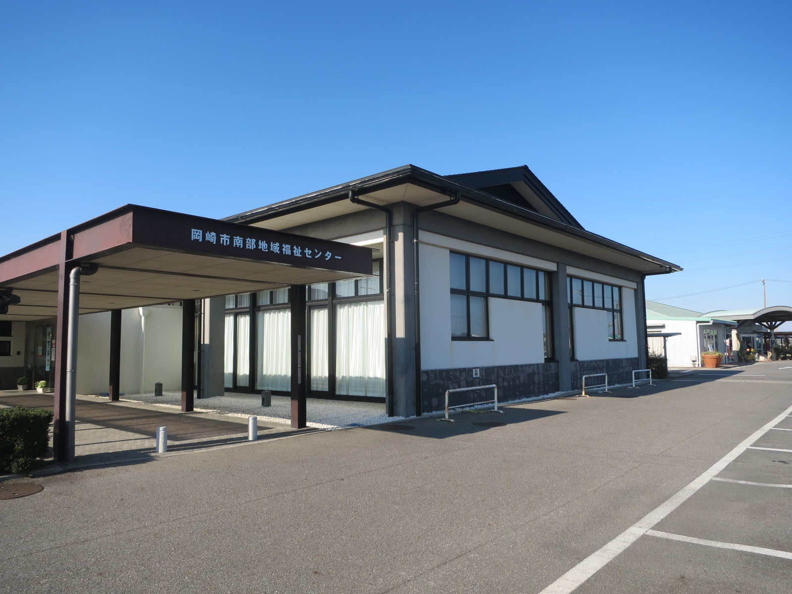 岡崎市南部地域福祉センター（岡崎市下青野町）